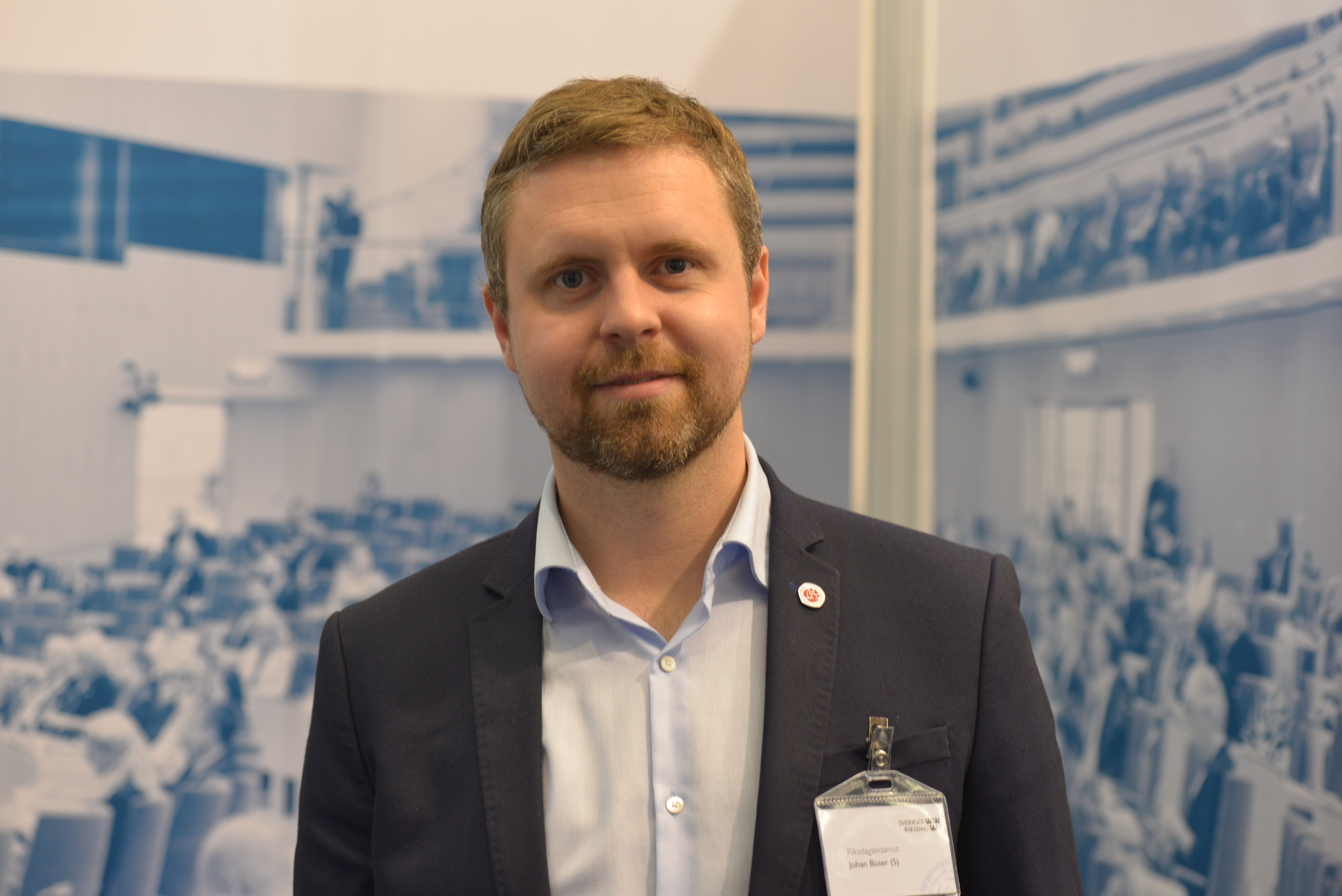 Johan Büser (S) i Riksdagens monter på Bokmässan i Göteborg 2017.